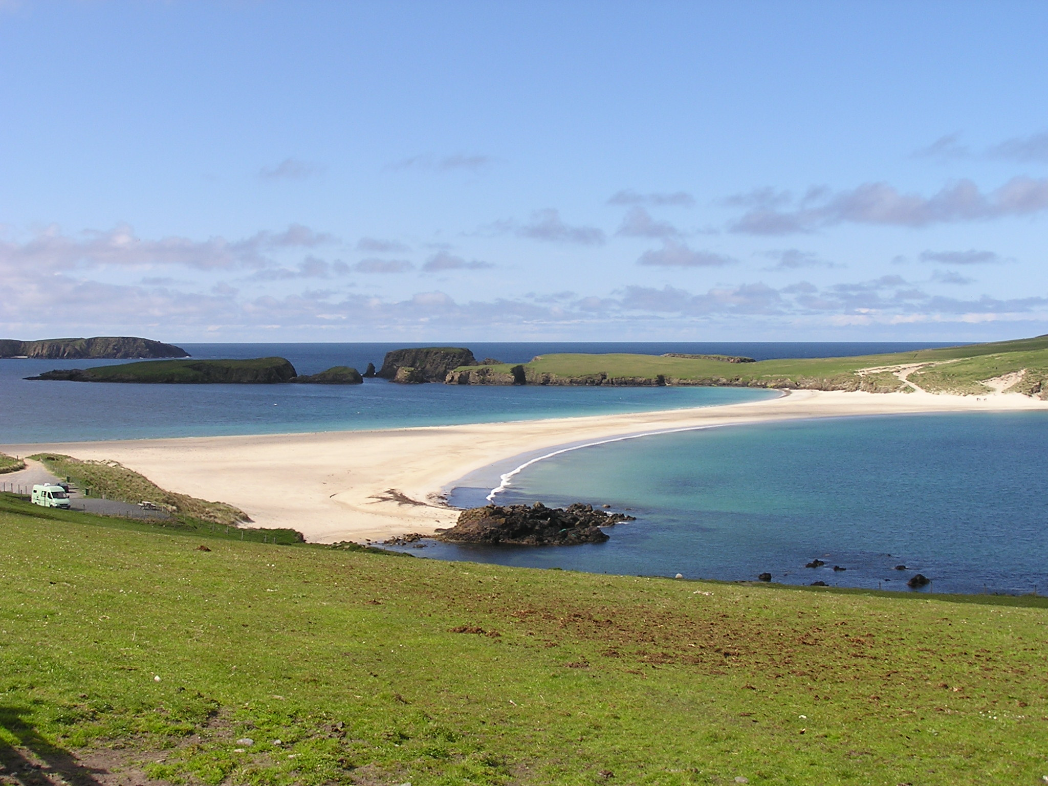 Sandstrand wie in der Karibik - Tombolo zwischen Mainland und St. Ninian's Isle, Shetland